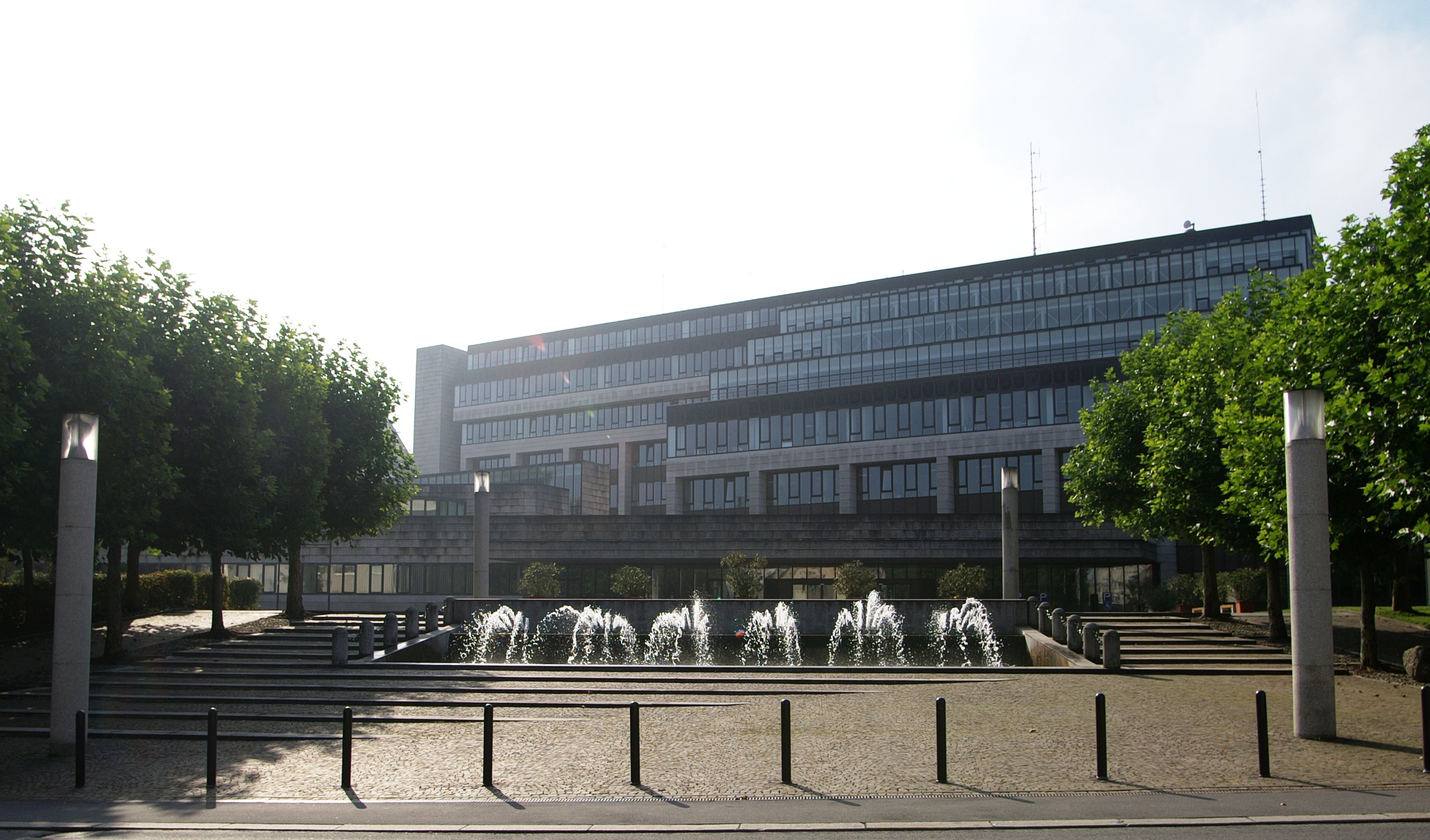 Landhaus Bregenz, Sitz der Vorarlberger Landesregierung. Architekt: Holzbauer